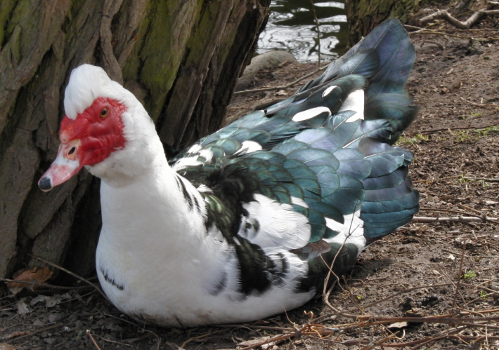 Svensk Myskanka, Pildammsparken, Malmö